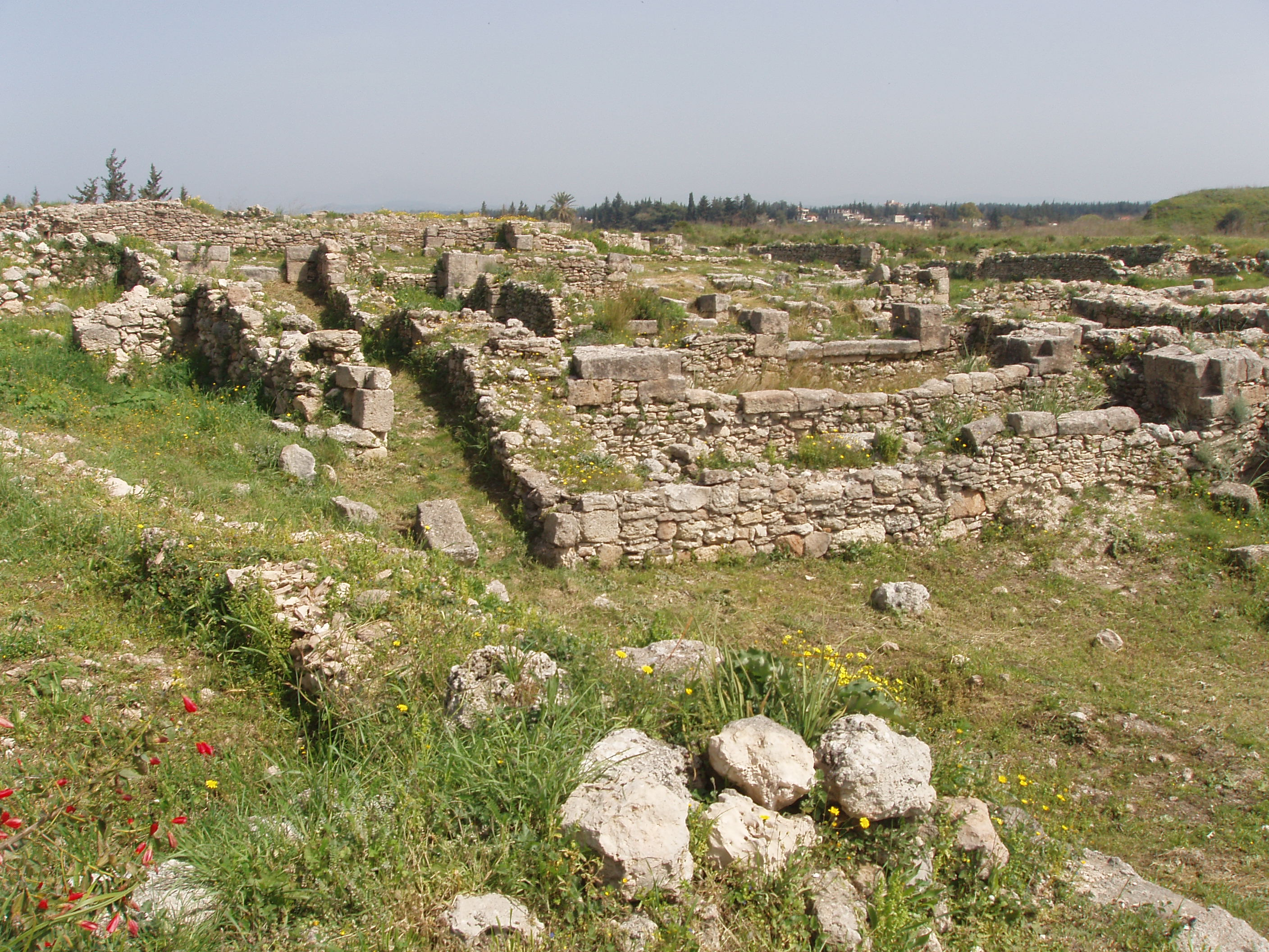 Ugarit, wiederentdeckter spätbronzezeitlicher kanaanitischer Stadtstaat nahe dem heutigen Latakia in Syrien; Ausgrabungen im Palastbereich. Nach sorgfältiger Analyse der zahlreich gefundenen Keilschrft-Tontafeln, darunter viele auch mit ugaritischen Keilschriftzeichen beschrieben, konnten diese Zeichen einem Alphabet zugeordnet werden; ein der frühesten Nachweise dieser Art.